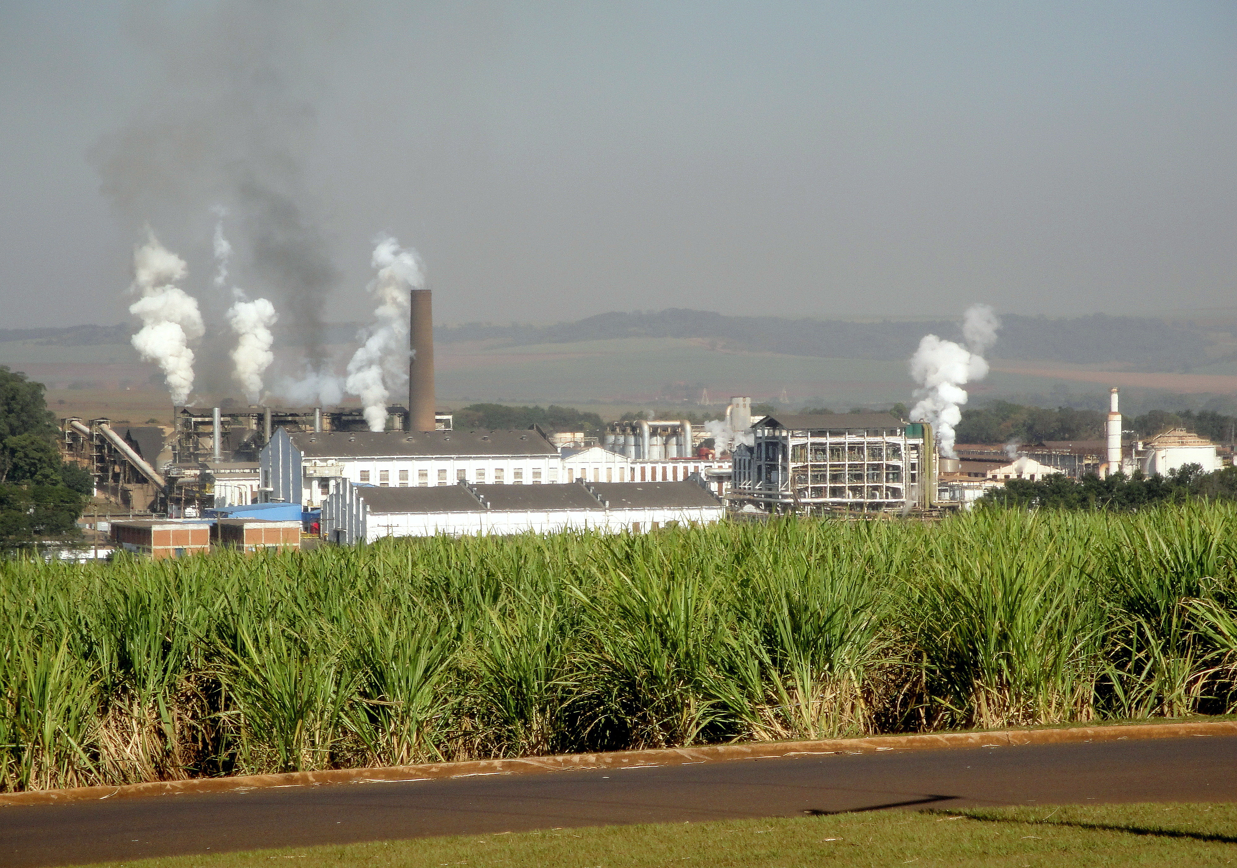 Usina São Martinho, Fábrica de Açucar e Etanol - Pradópolis